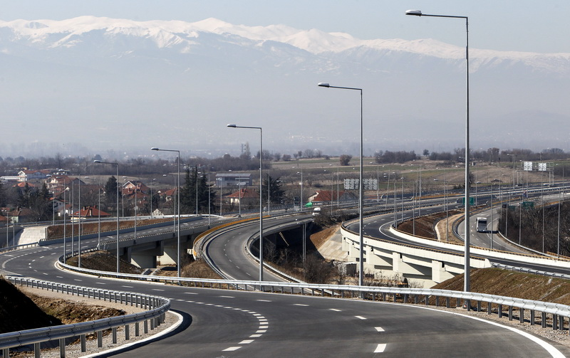 Клучка А1/А2/А3